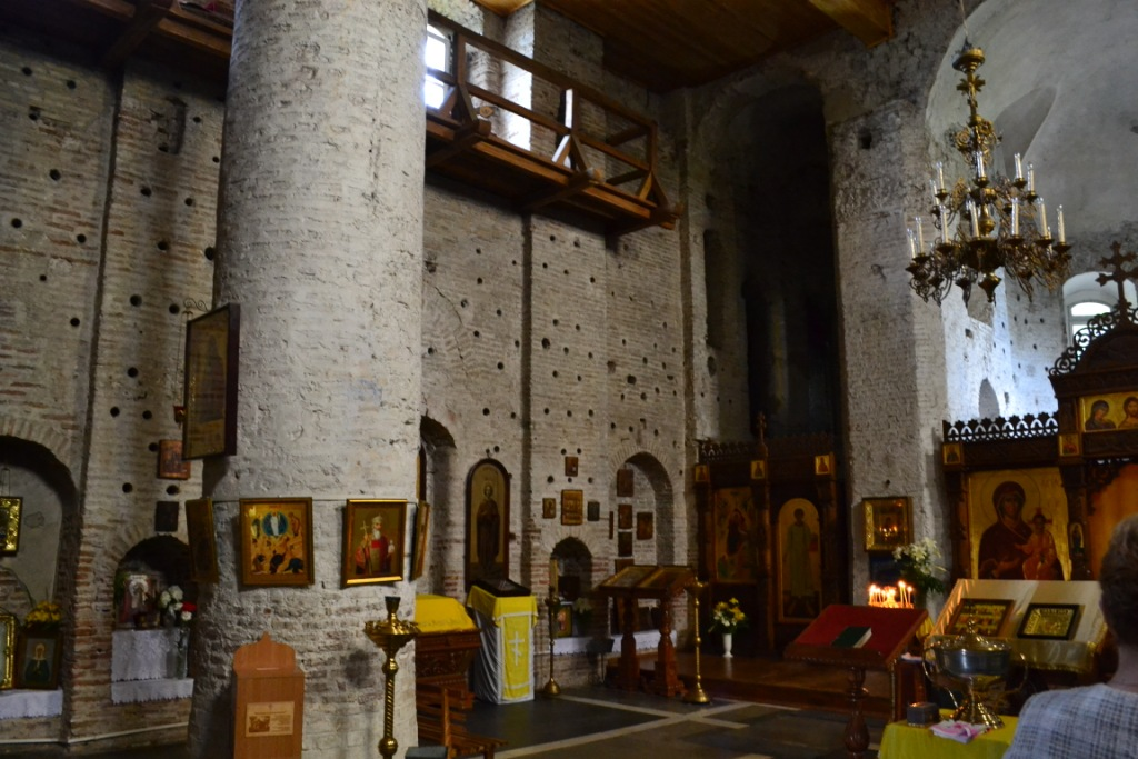 Беларуская (тарашкевіца): Барысаглебская (Калоская) царквадэкаратыўнае аздабленьне царквы:каменны і маёлікавы дэкор на фасадахфрагмэнт арнамэнтальнага дэкору падлогіфрагмэнты жывапісу ў інтэр’еры. г. Горадня This is a photo of Belarusian heritage monument. Reference number: 410Г000004 ( WLM)